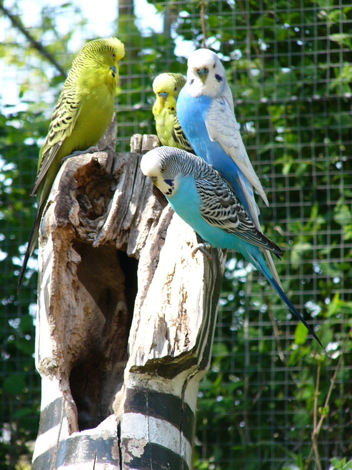 Wellensittiche im Hofer Zoo